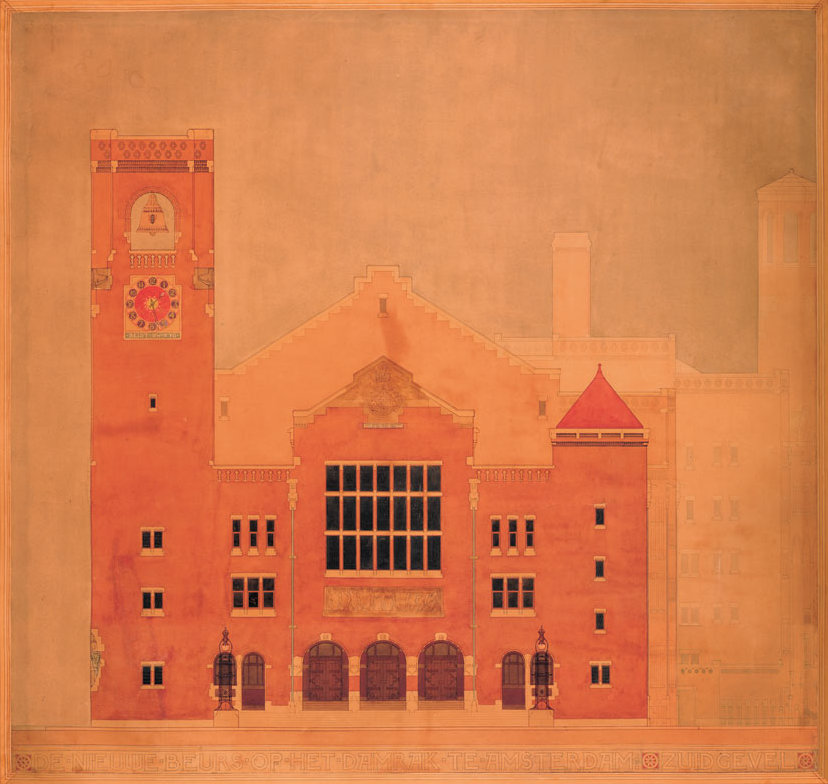 Nieuwe Beurs op het Damrak te Amsterdam. Zuidgevel. Hendrik Petrus Berlage. Het blad met de geaquarelleerde voorgevel toont het laatste, uitgevoerde ontwerp van de Beurs uit 1899-1900. 51″ N, 4° 53′ 44.73″ E